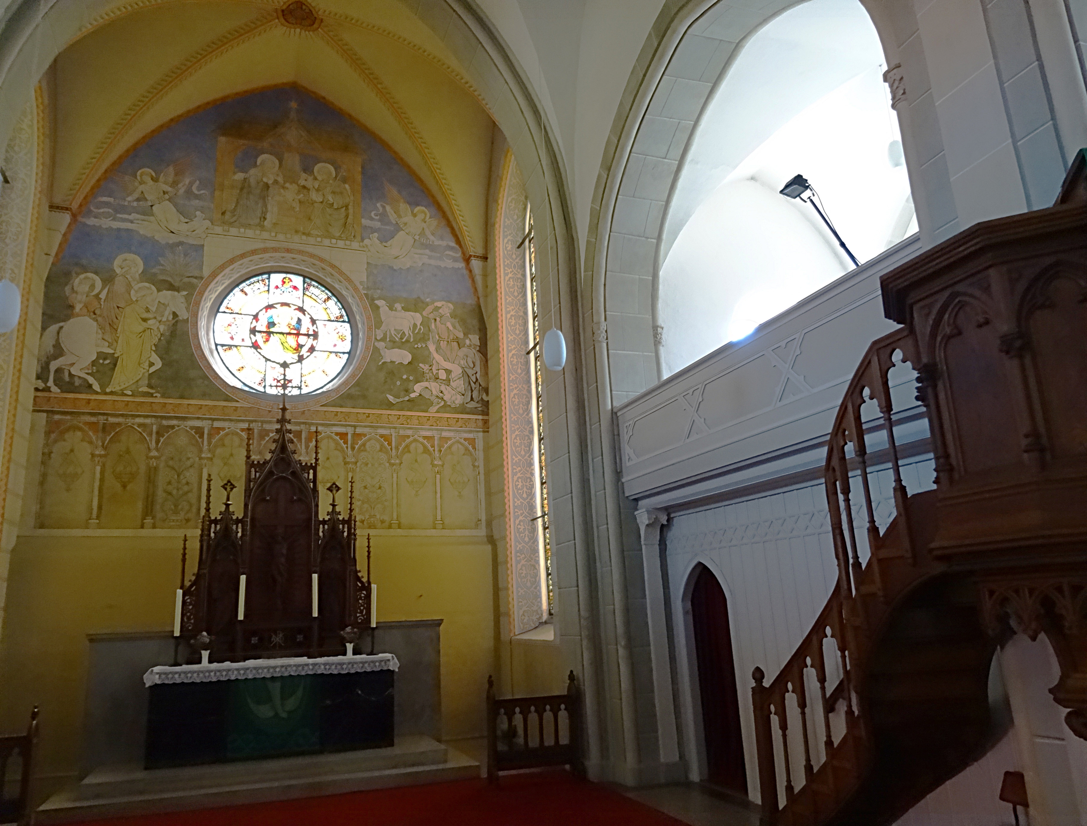 St.-Antonius-Kirche Hasselfelde, Altarraum mit Wandbild von Adolf Quensen (1902) und Kanzel